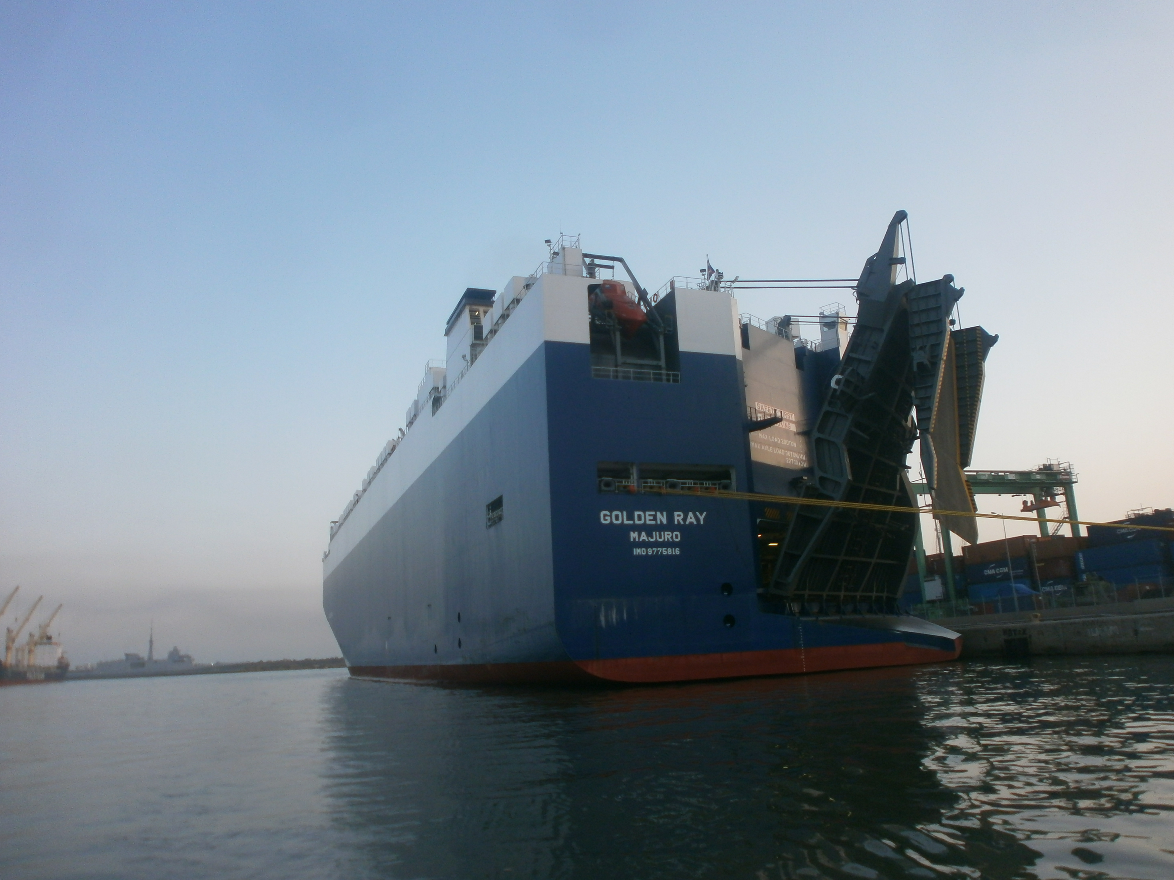 Car carrier GOLDEN RAY à quai à Casablanca - Morocco - IMO: 9775816 Pavillon: Majuro Genre du navire: Cargo Année de Construction: 2017